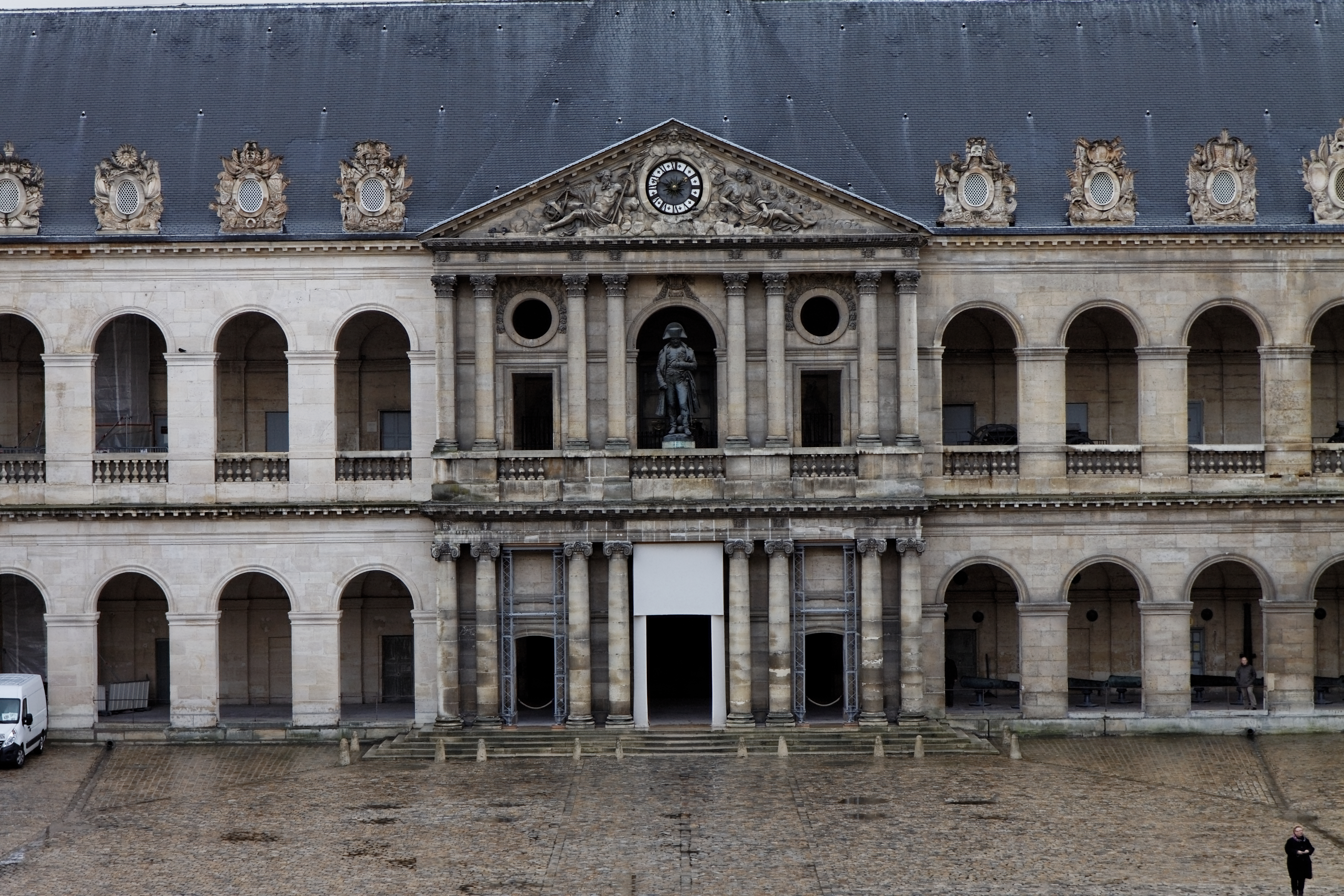 La cours d'honneur des Invalides avec à gauche la façade, plus claire, ayant été nettoyée par sablage.